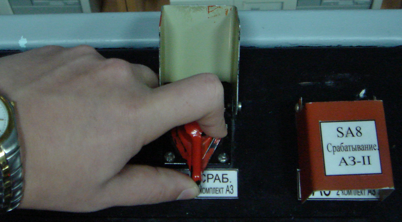 Ключ аварийной защиты реактора ВВЭР-1000 (элемент полномасштабного тренажёра БЩУ, идентичный реальному оборудованию)